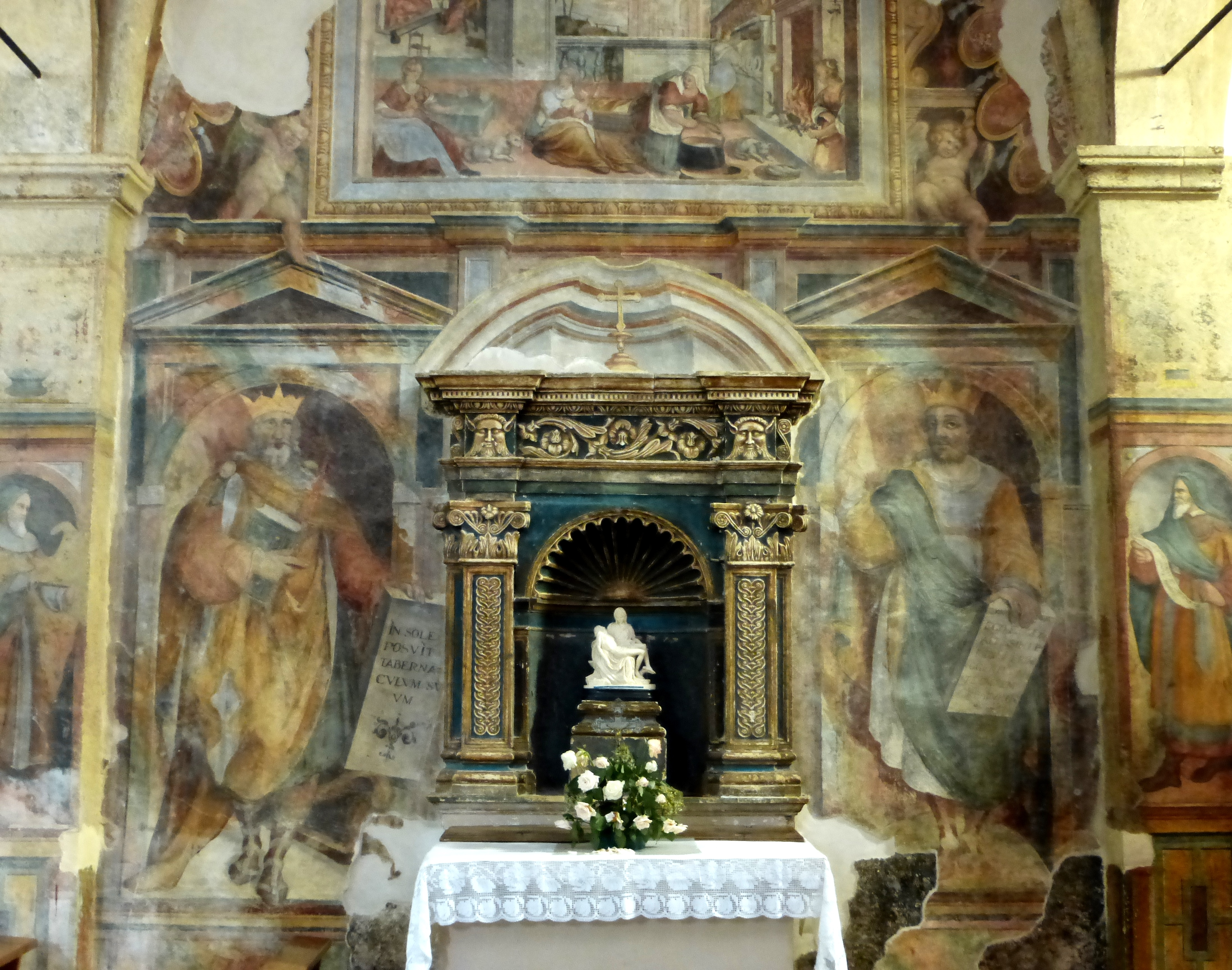 Chiesa di Santa Maria delle Grazie a Magliano de' Marsi (AQ)